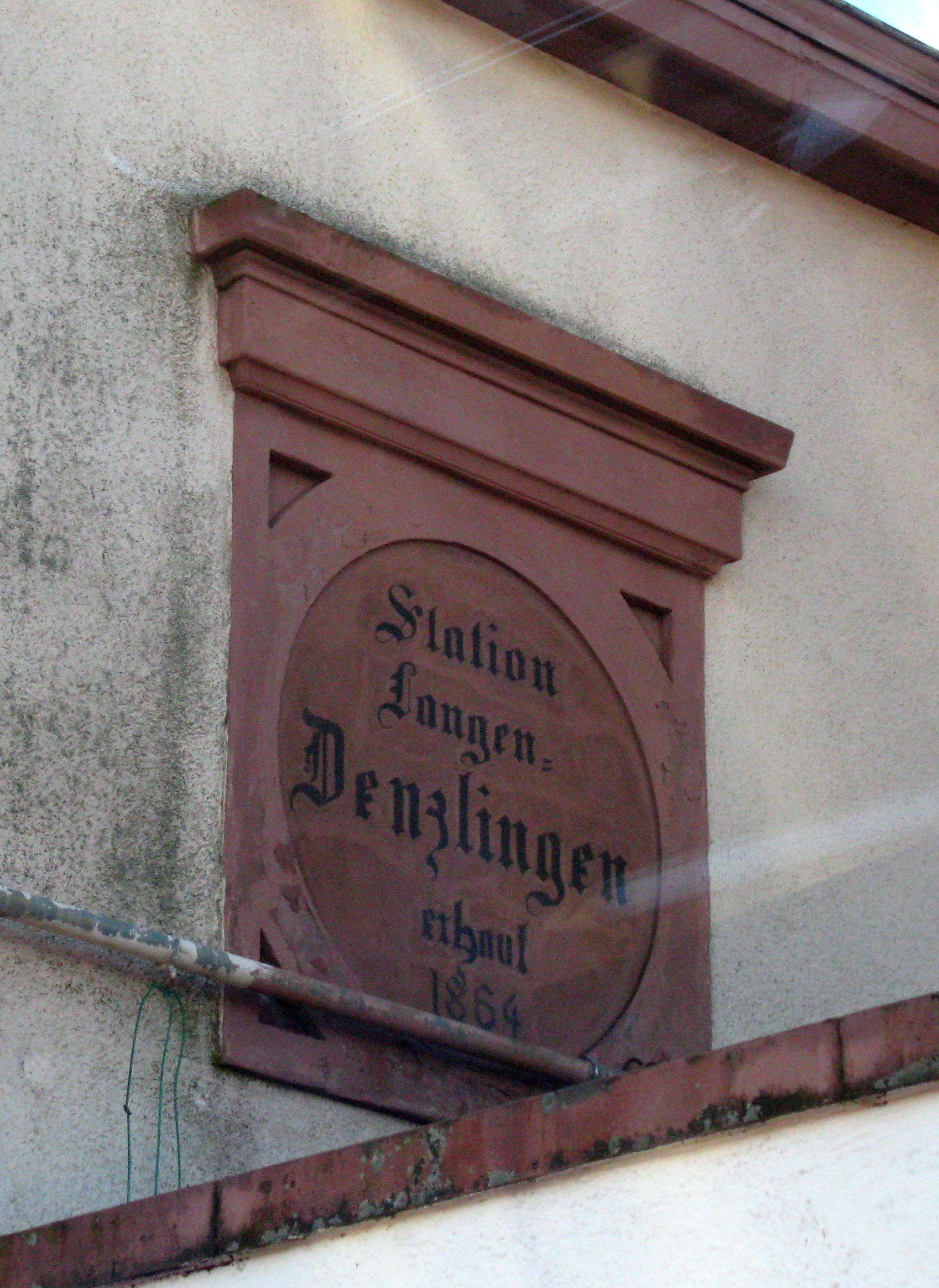 Bahnhof Denzlingen, erbaut nach Plänen von Friedrich Eisenlohr, Inschrift mit dem früheren Stationsnamen Langen-Denzlingen